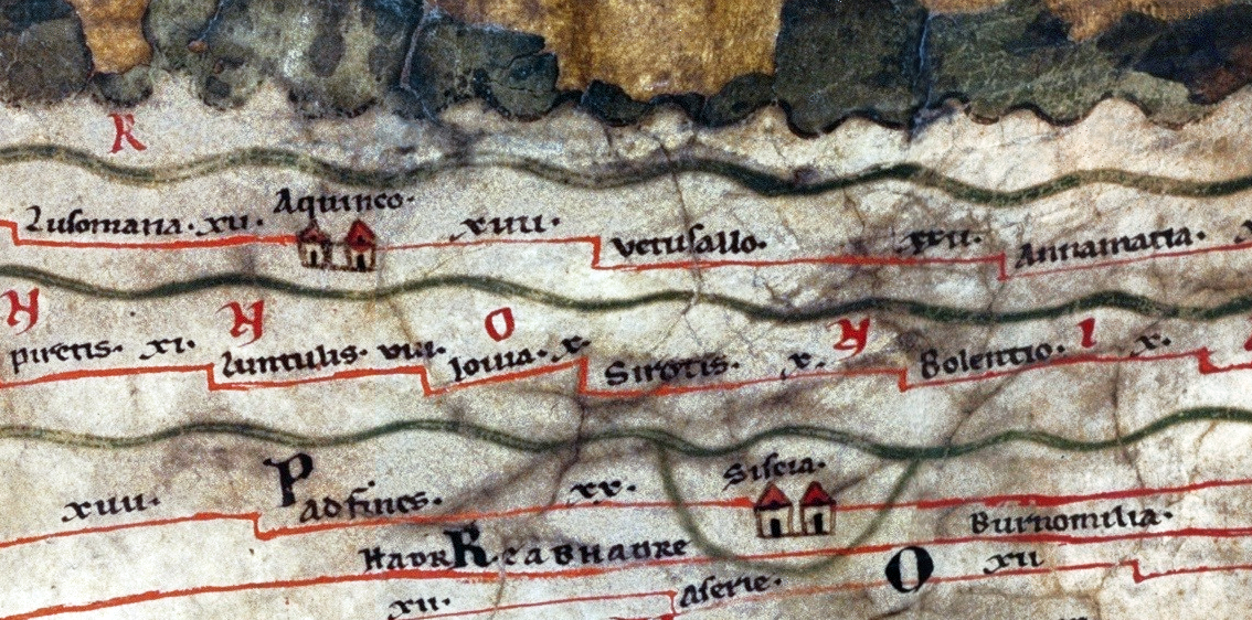 Ausschnitt aus der in Colmar entstandenen Tabula Peutingeriana in der Nationalbibliothek Österreich.